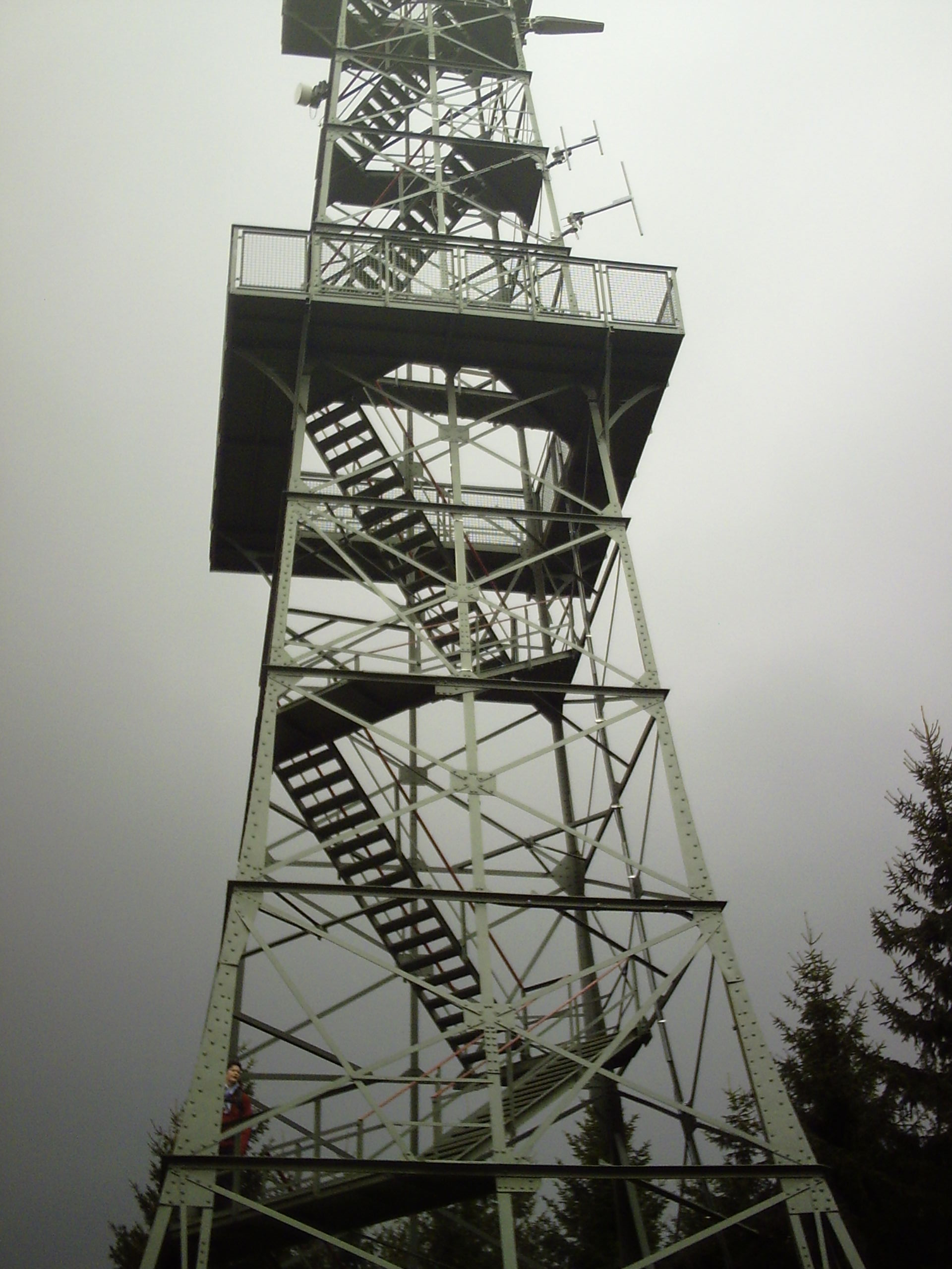 Turm auf dem Poppenberg